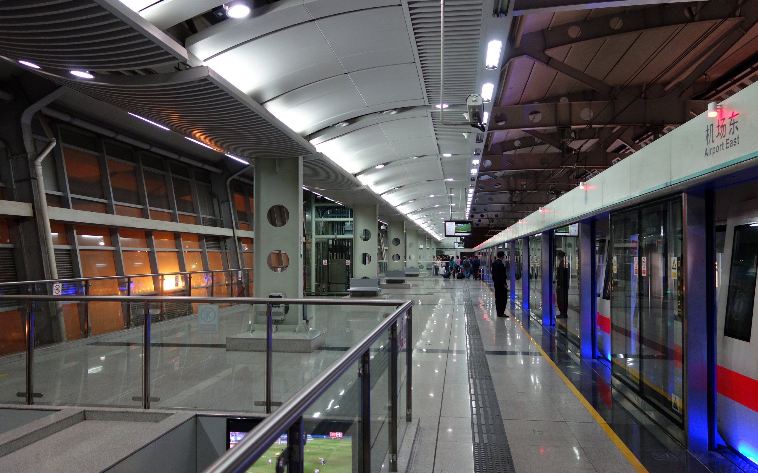 中文（中国大陆）: 深圳地铁罗宝线机场东站站台